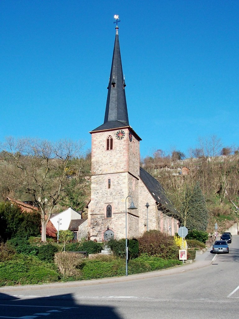 Dorfkirche in Laudenbach an der Bergstraße - im Hintergrund einige Weinberge